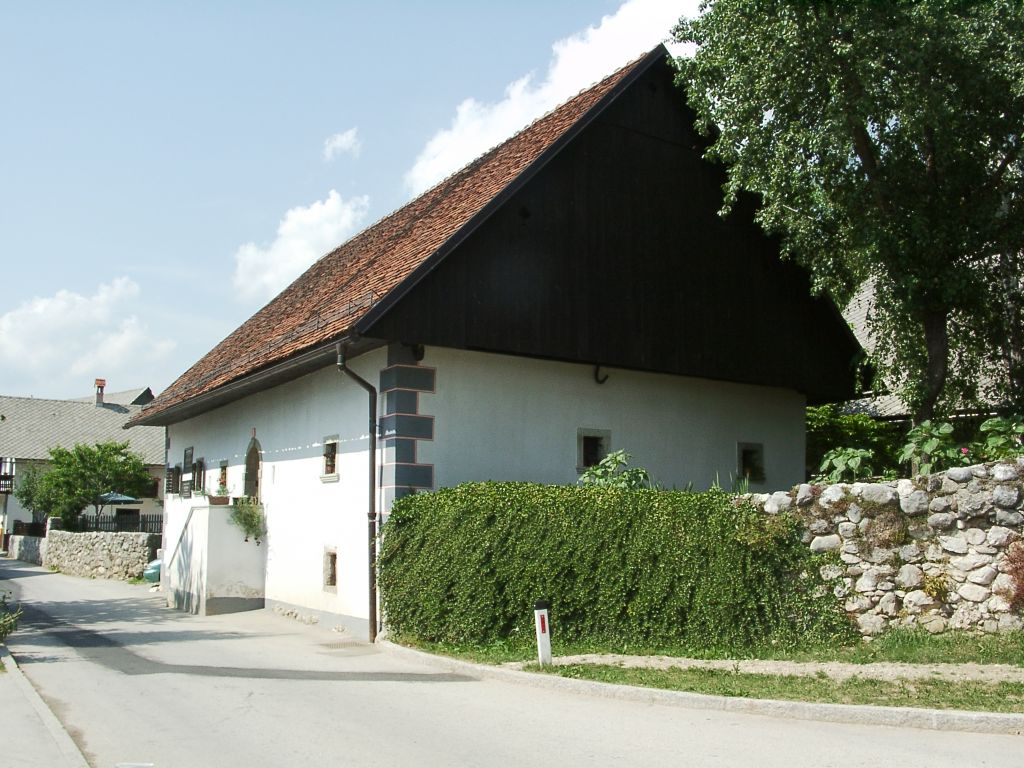 Rojstna hiša Franceta Prešerna v Vrbi.